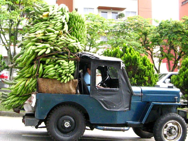 Los hermosos platanitos verdes de mi tierrita cafetera esos que le dan sombra al cafe y que saben rico con la trucha de Salento. Fiestas de la cosecha de Pereira - 2006 Remark: Jeep CJ3B ?